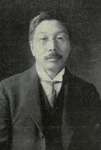 星野行則加島銀行